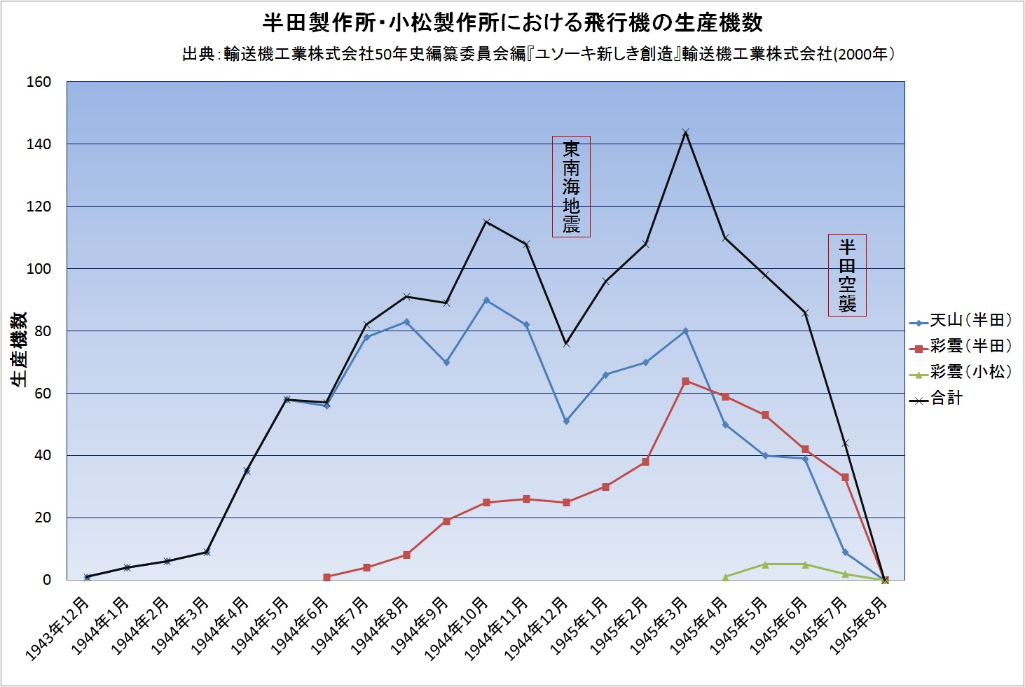 中島飛行機半田製作所における飛行機の生産機数